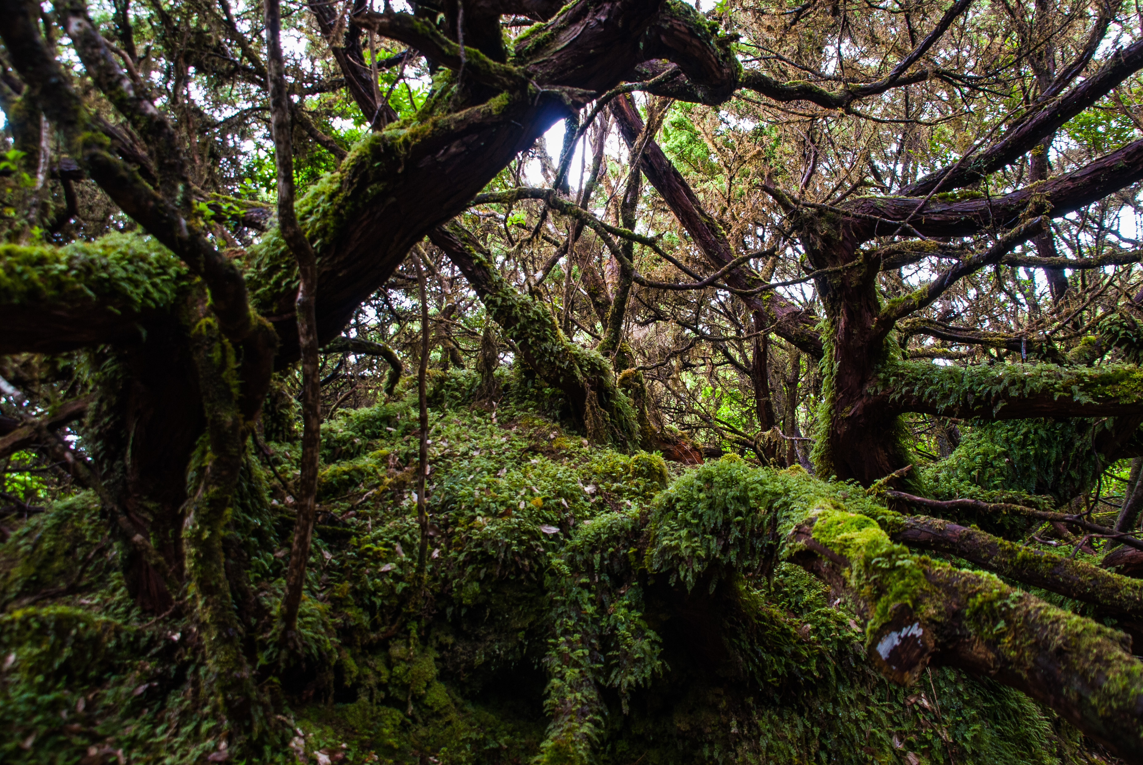 Mistérios Negros Trilhos dos Açores PRC1TER